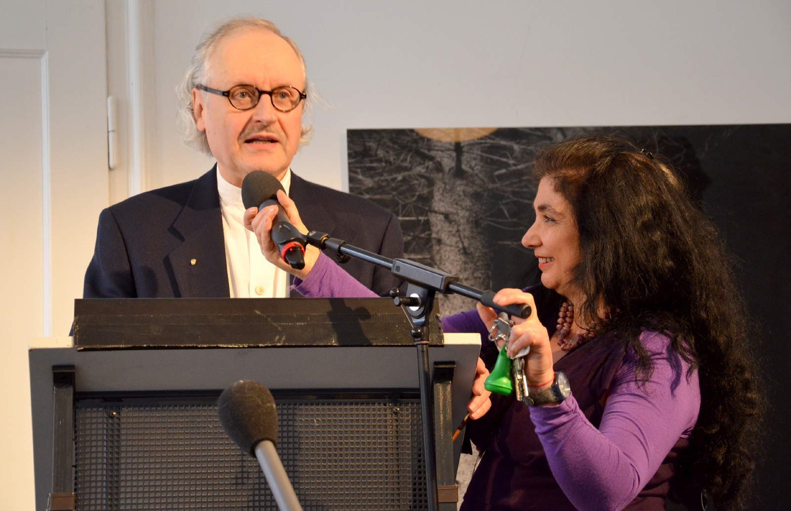 In der Veranstaltung Gleichheit für Fortgeschrittene im Maestro-Saal des Künstlerhauses während des 4. Festivals der Philosophie 2014 in Hannover hielt der Philosoph Bernhard Taureck nach einer Ankündigung durch Assunta Verrone seinen Vortrag ...